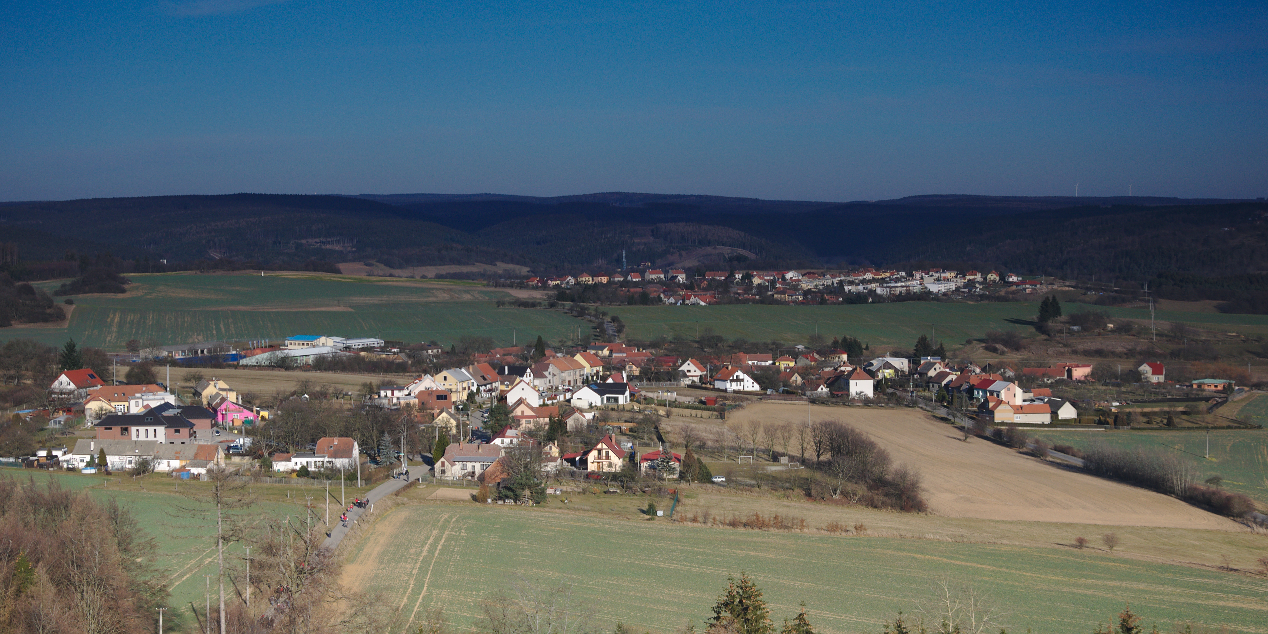 Veselice a Vavřinec z Veselické rozhledny, okres Blansko